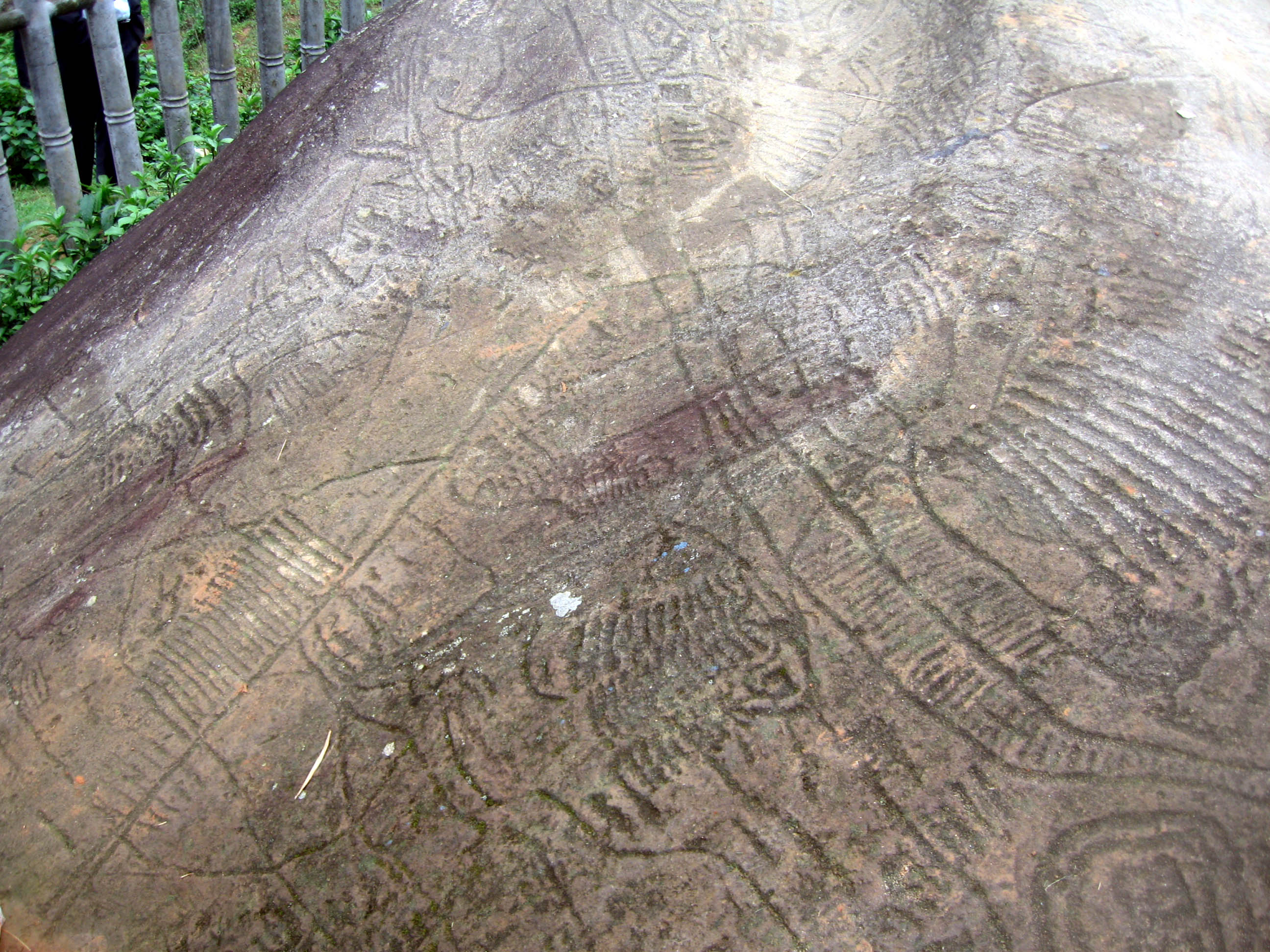 Bãi đá cổ ở SaPa, Việt Nam